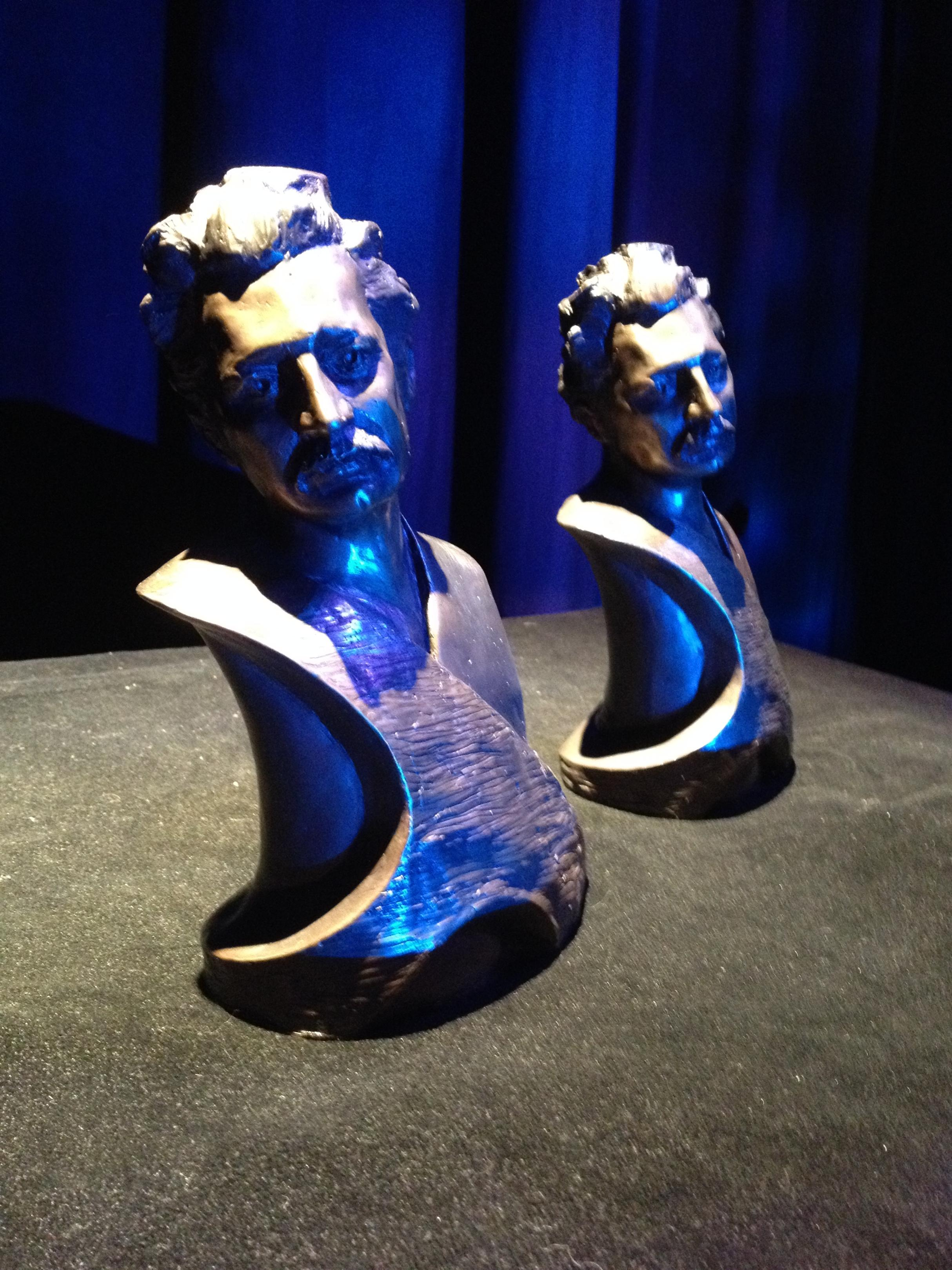 Photo du Prix Riel